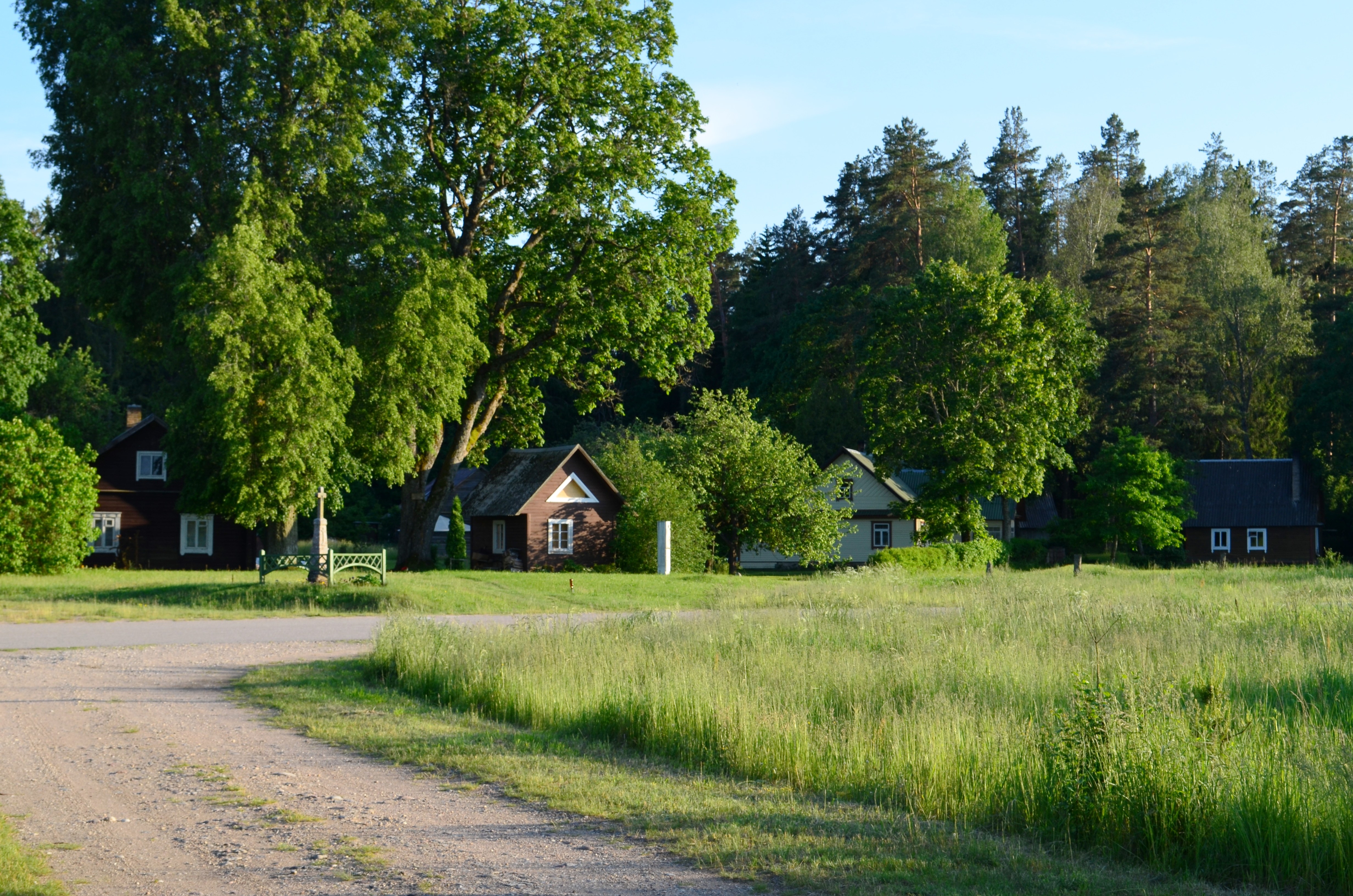 Minčia, Utenos r.